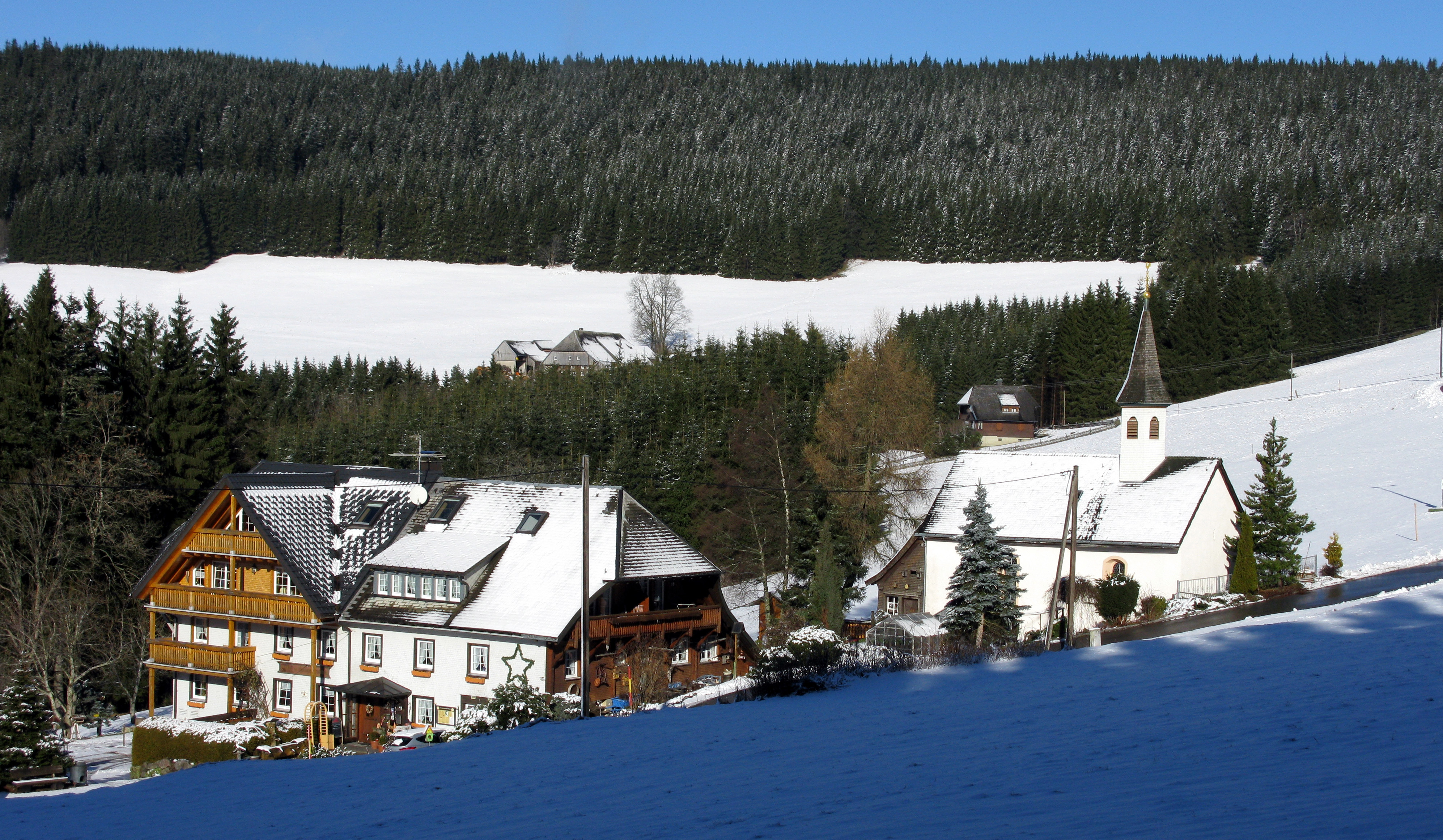 Heiligenbrunnen in Titisee-Neustadt mit Gasthof und Kapelle